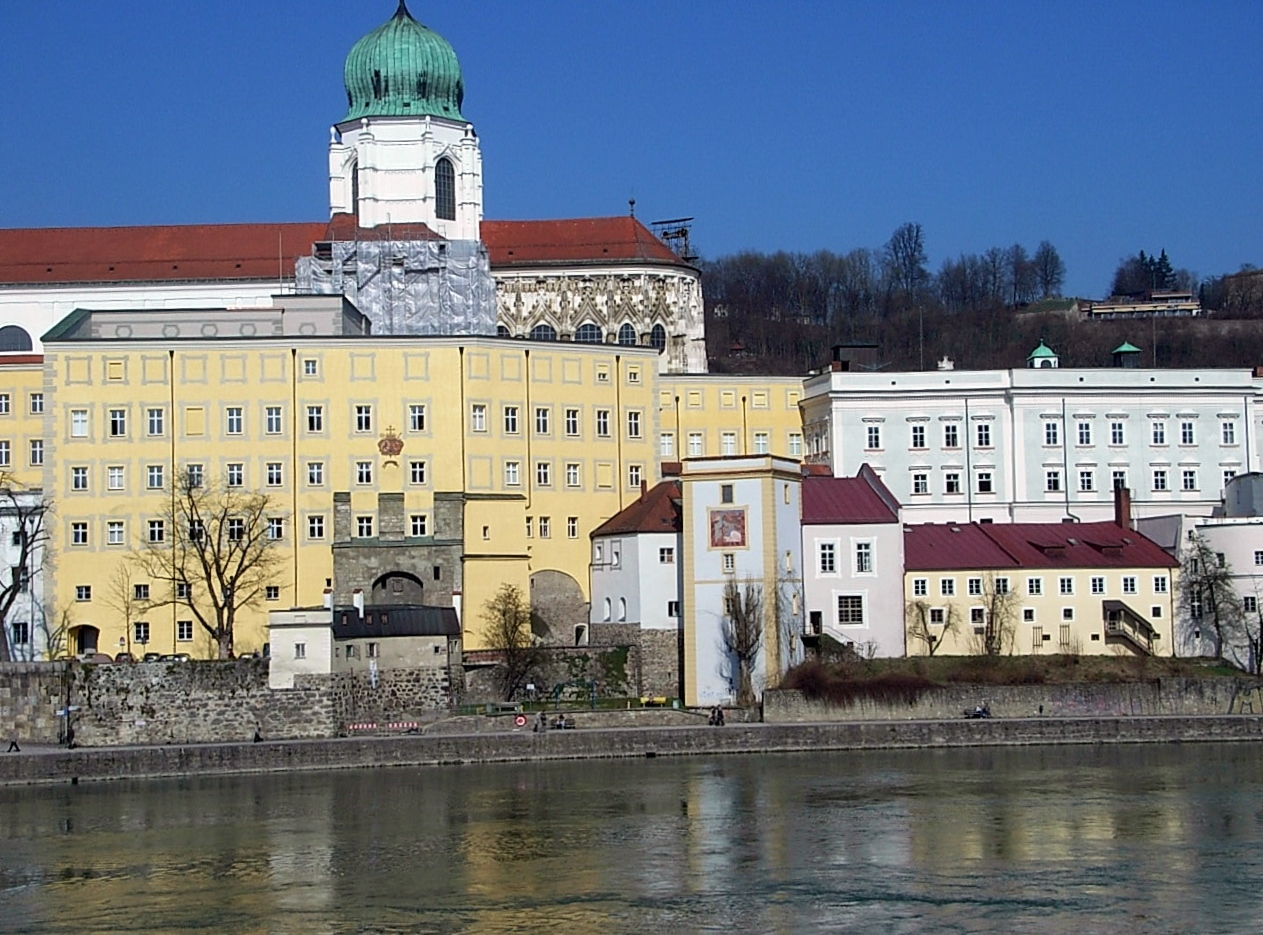 Passauer Residenz